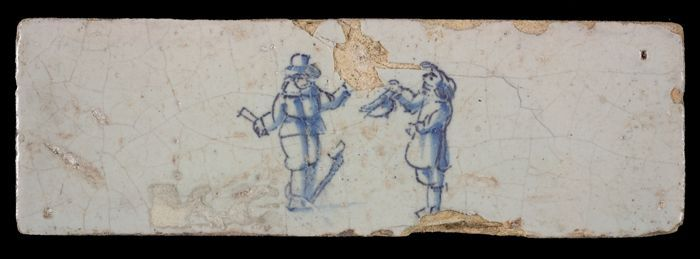 Randtegel, dubbel kinderspel, tiepelen of klinckaert